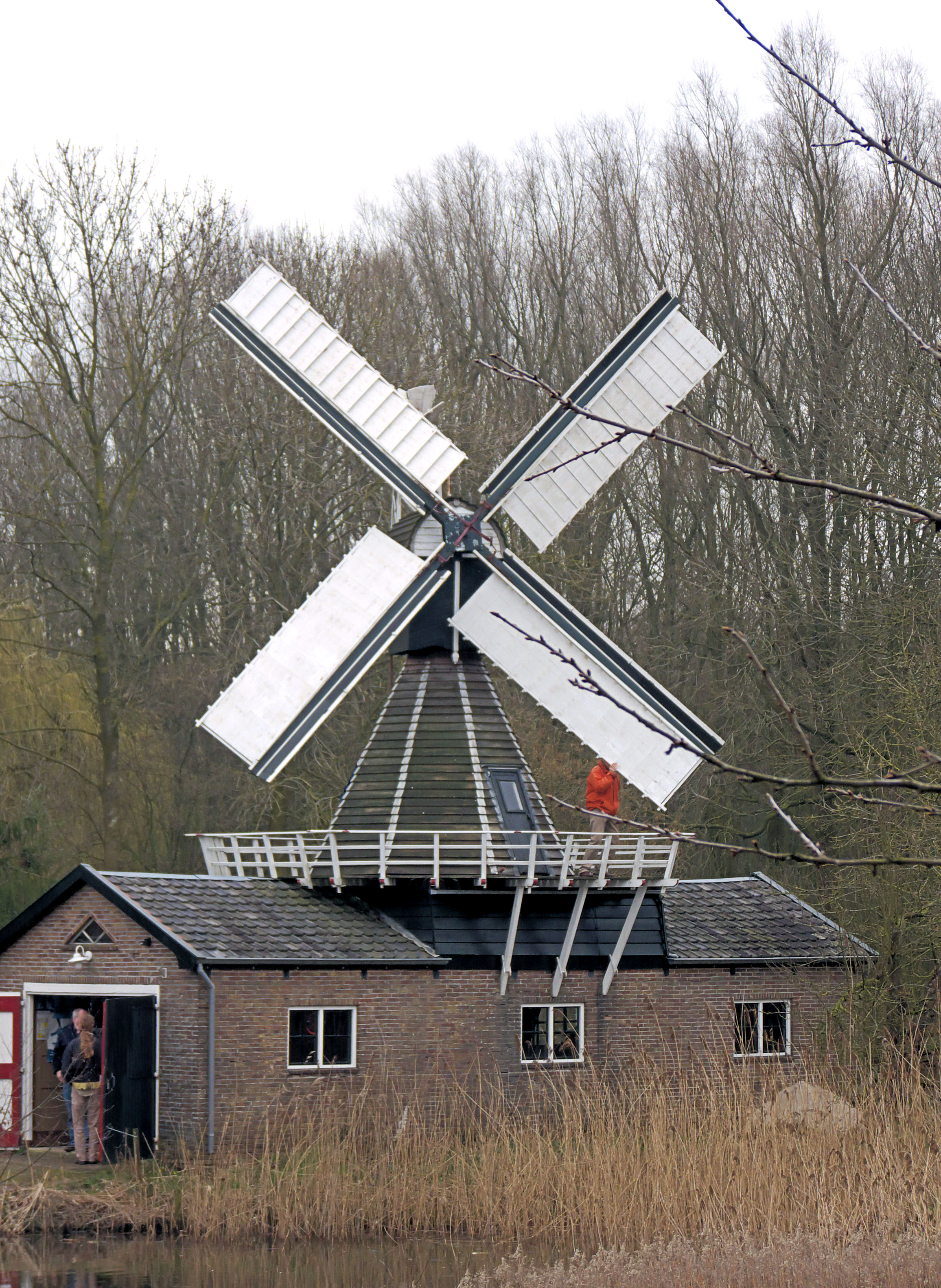 Spinnenkopmolen Wedderveer met gesloten kleppen